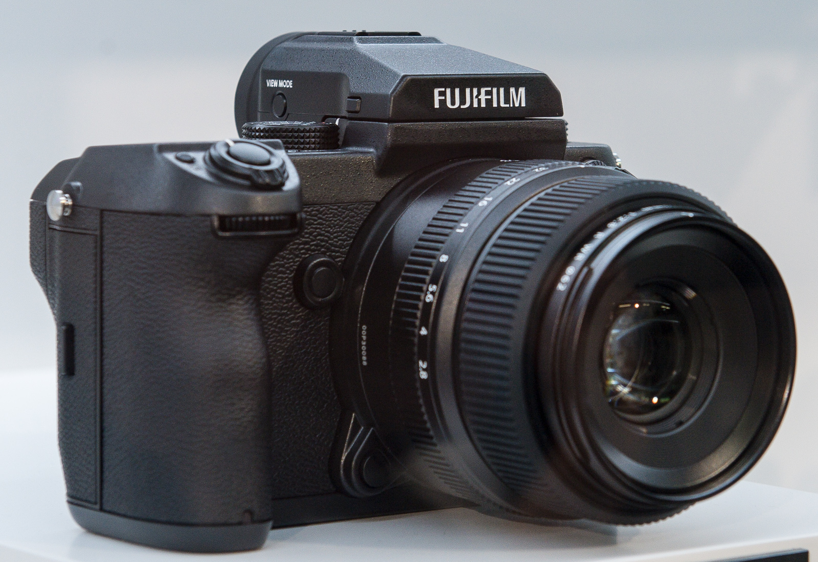 Fujifilm,GFX 50S,Kamera,Kölnmesse,Photokina 2016